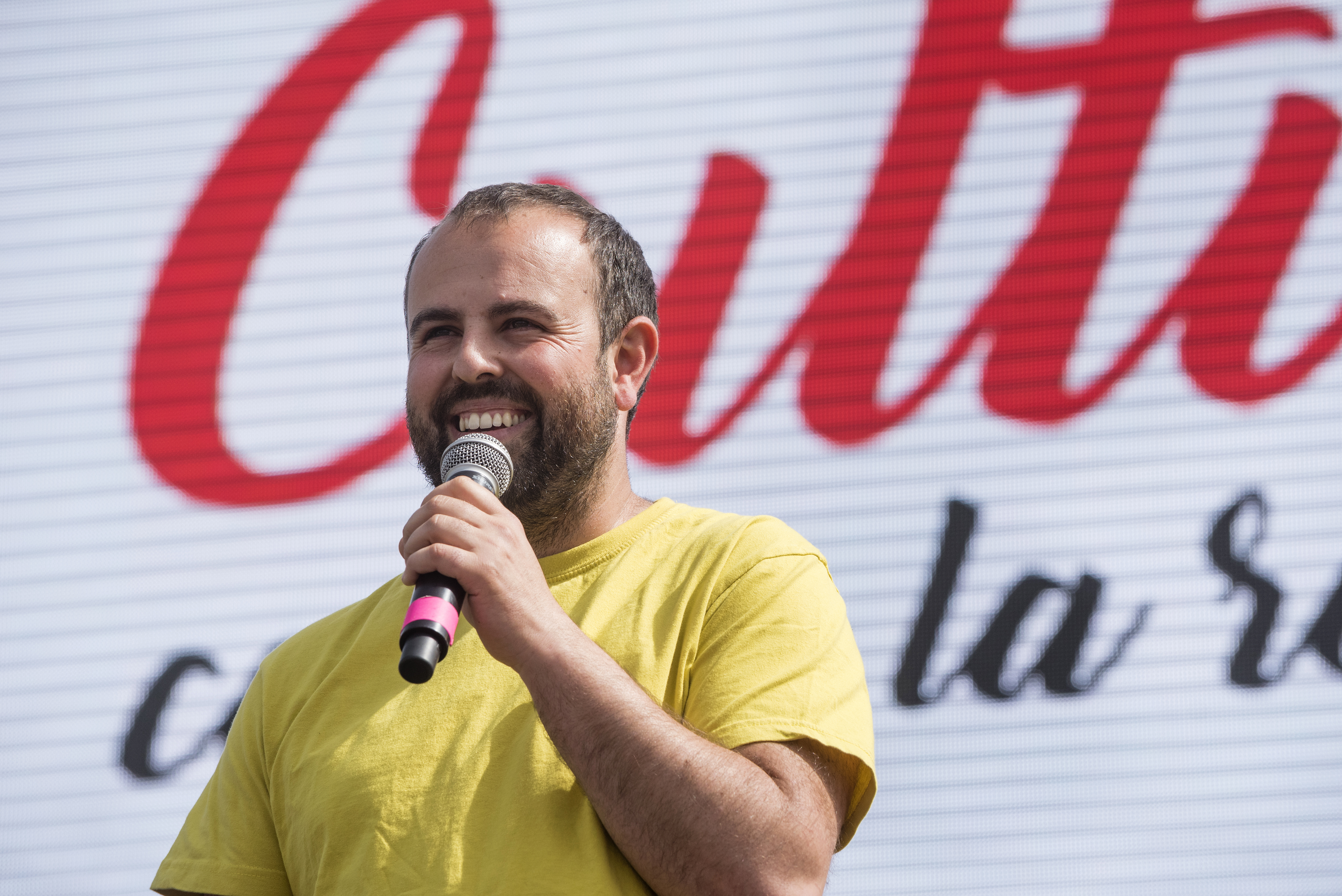 _DC73430